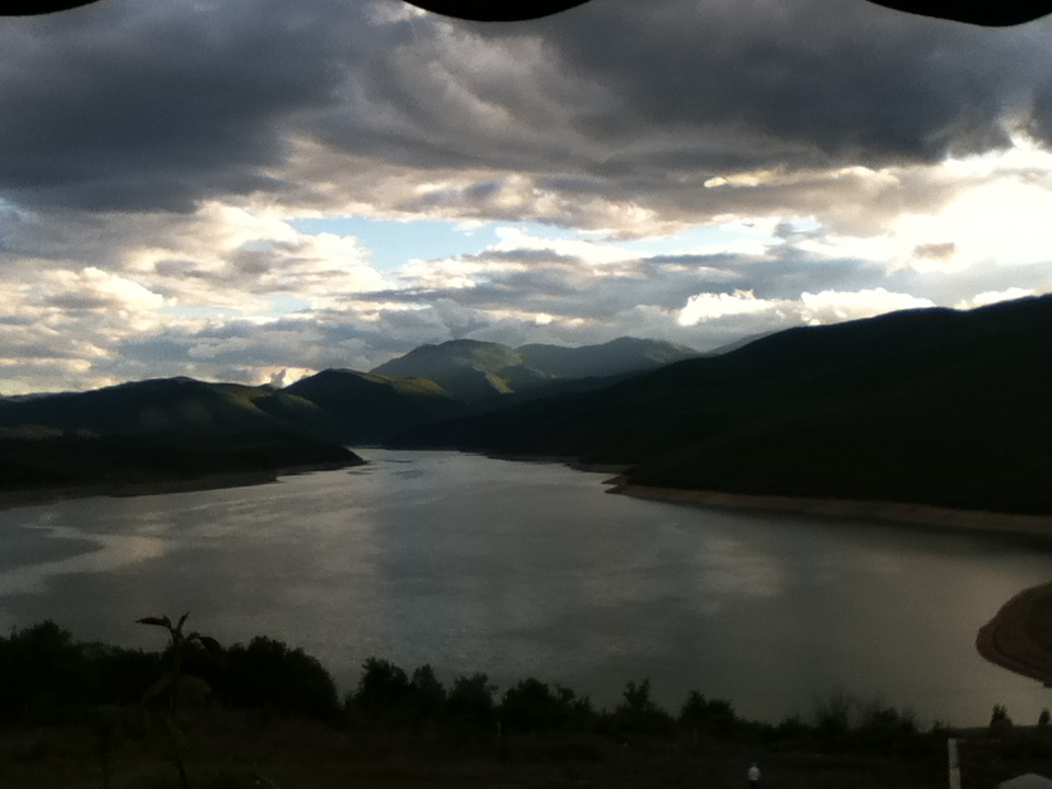 pamje e liqenit gjate nje dite me shi